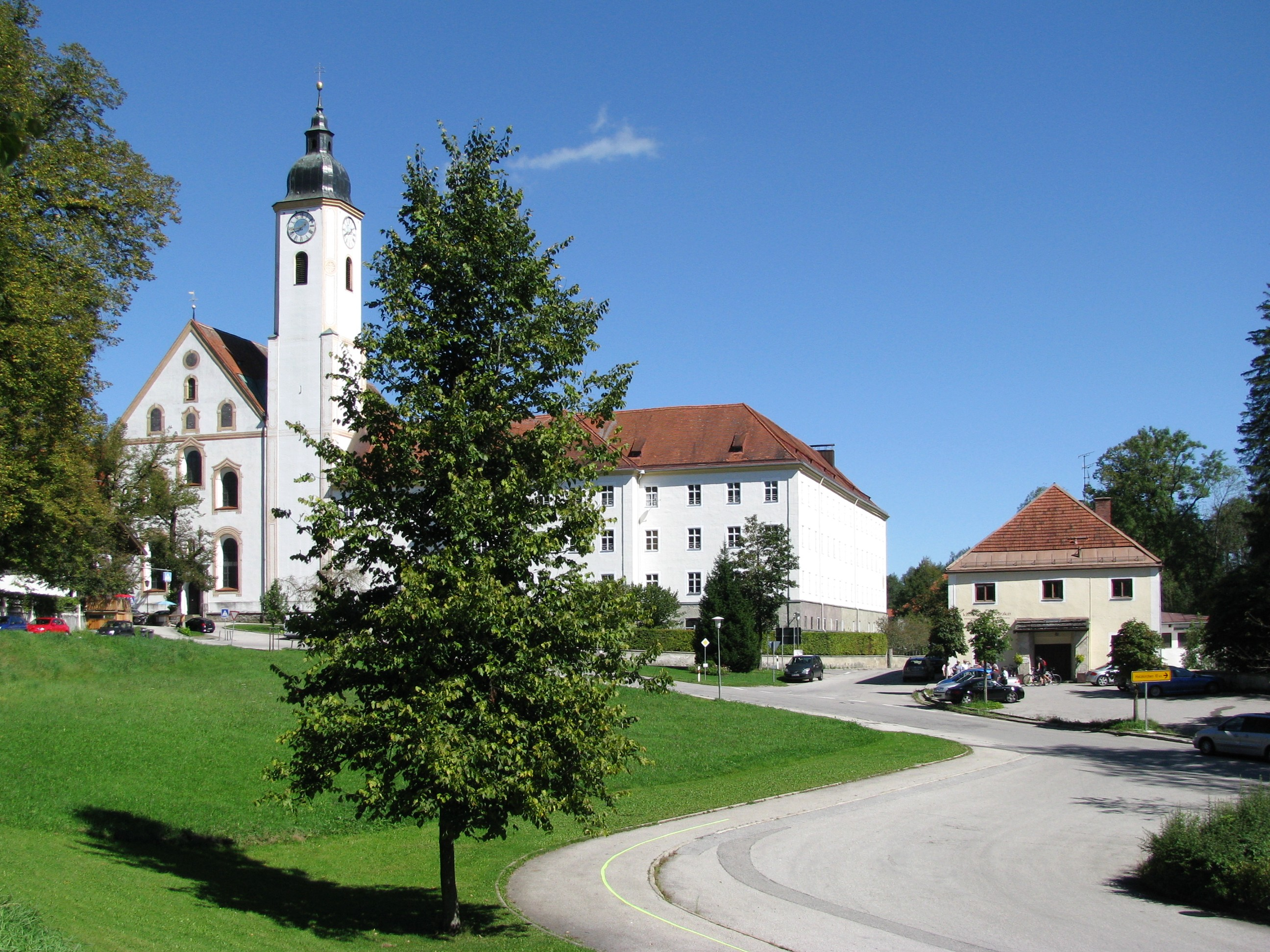 Kloster Dietramszell; rechts die Klosterschänke